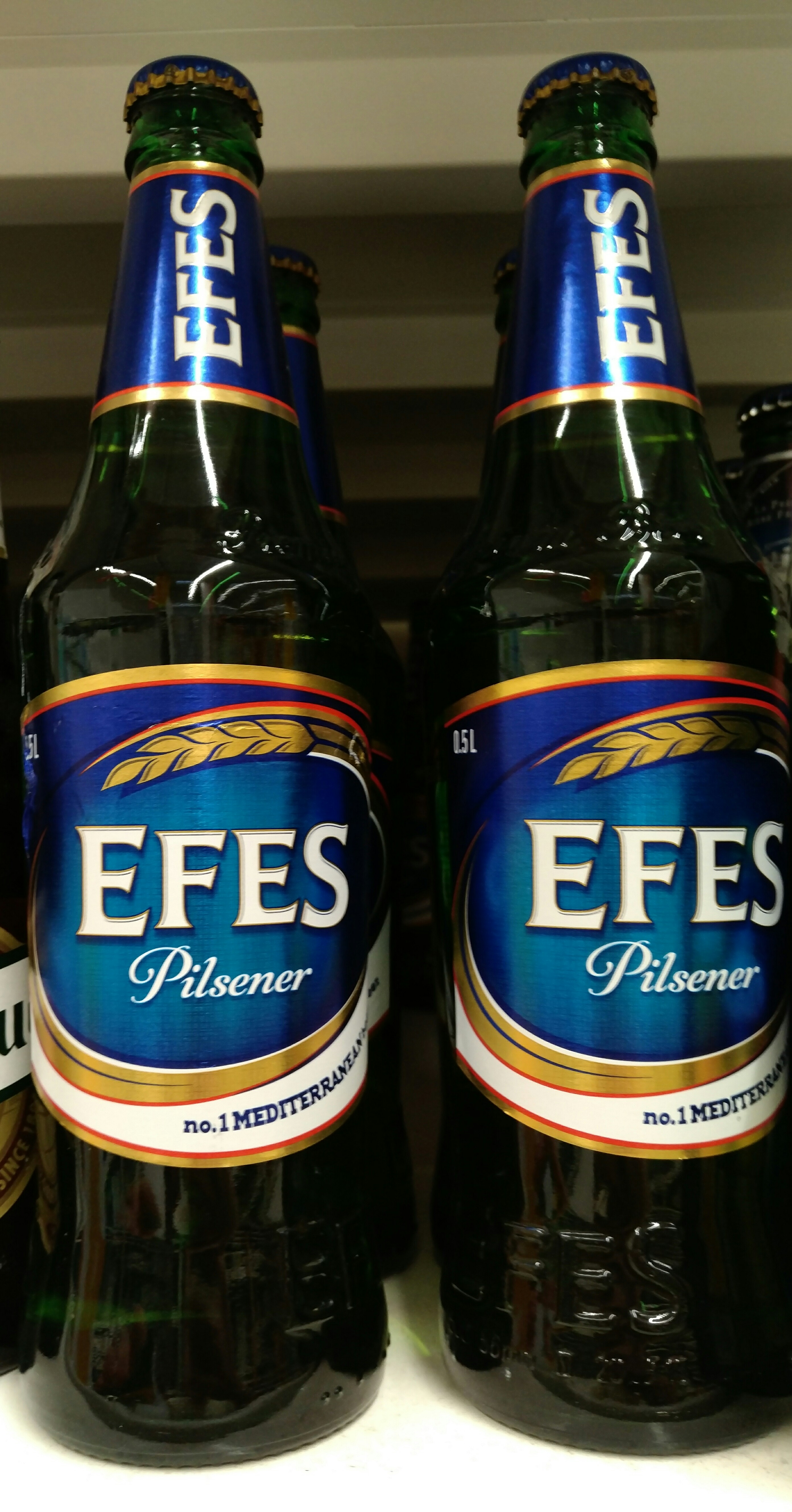 Efes beer